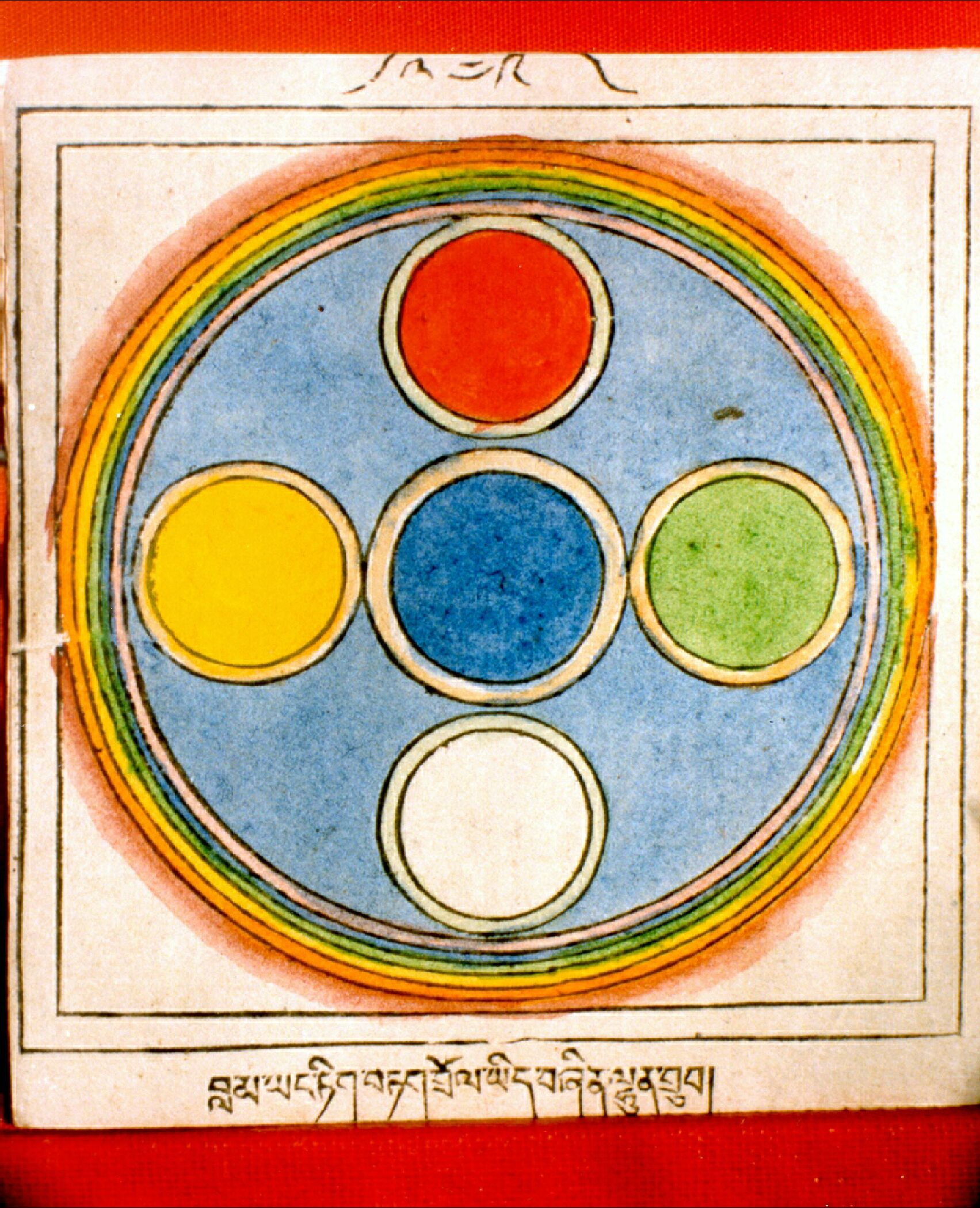 Öt elem mandala